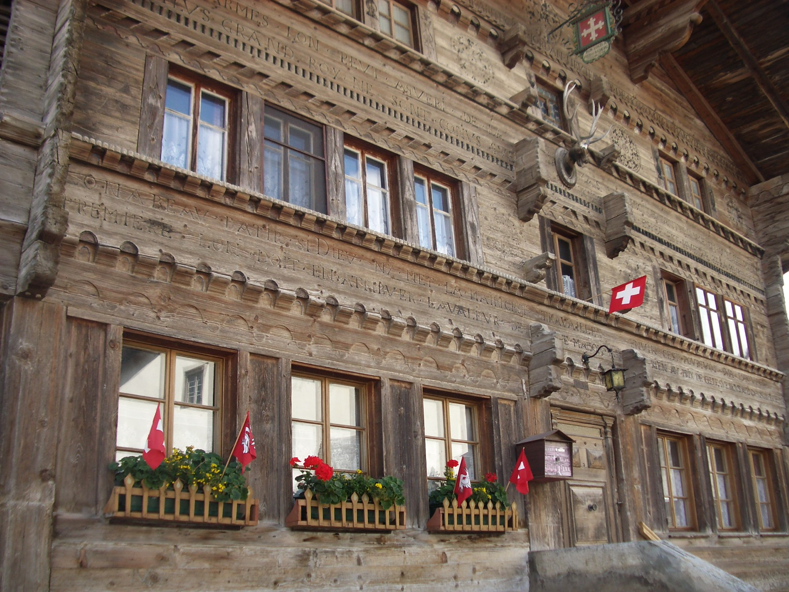 Montbovon, Switzerland self-made, August 2005